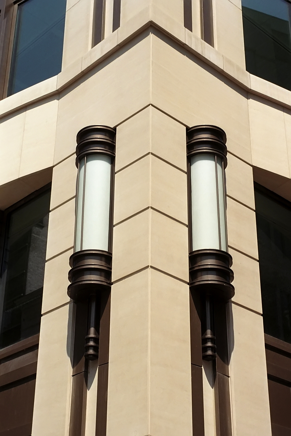 Belgique - Bruxelles - rue du Luxembourg 40 - immeuble « Luxembourg 40 » (Architecture postmoderne en Belgique - Atelier d'Art urbain)